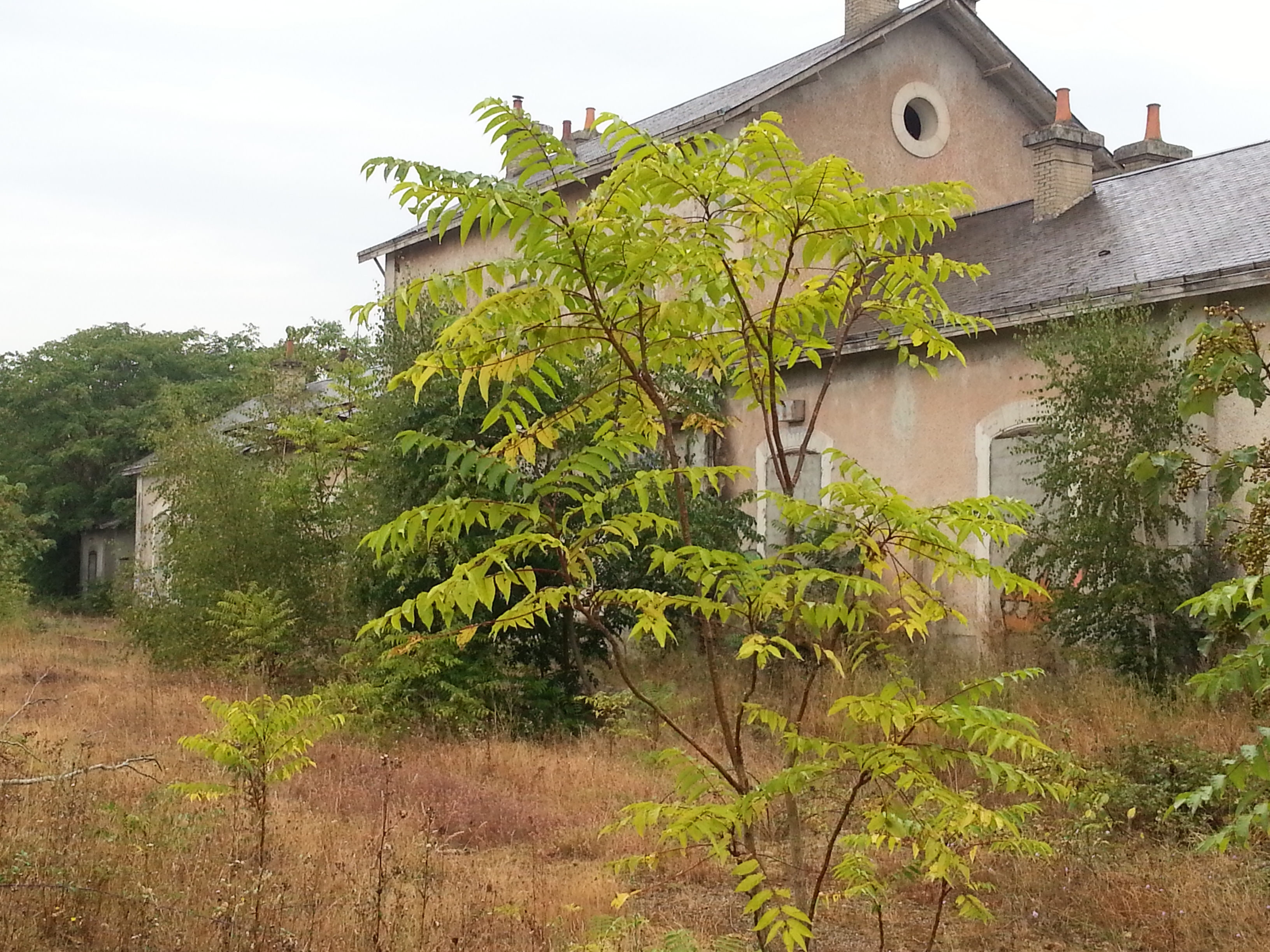 Vue de l'intérieur de la gare de La Flèche, abandonnée à la végétation